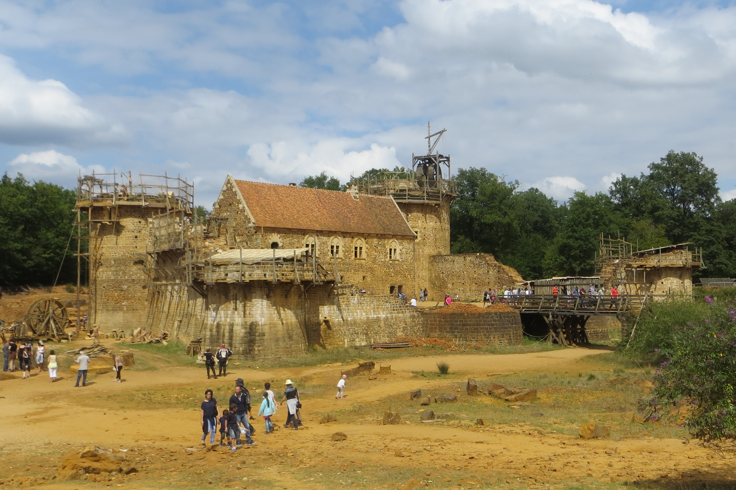 Le Château de Guédelon le 16 août 2015